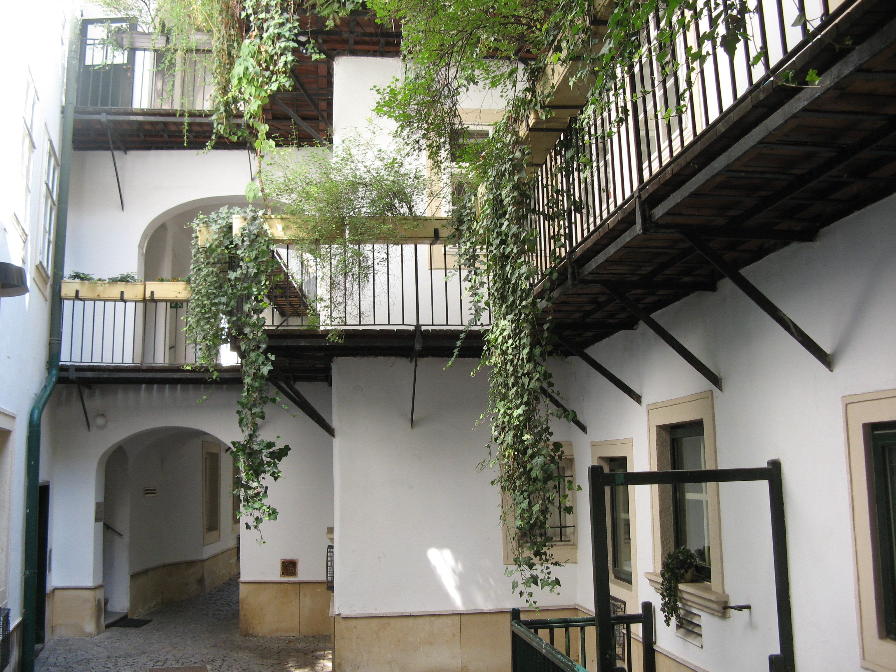 Erster Innenhof des Hauses Blutgasse Nr. 3, Wien-Innere Stadt